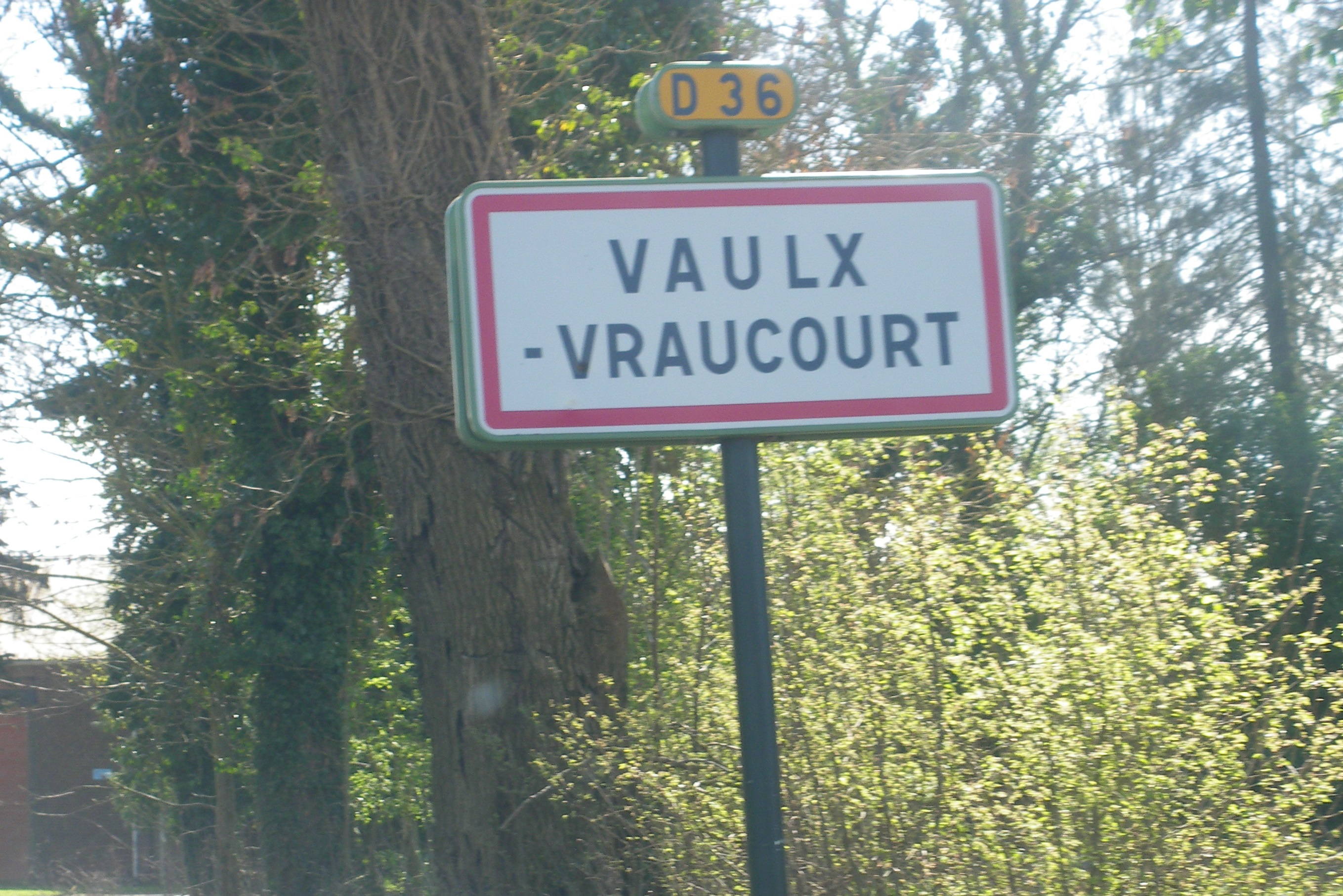 Vue d'un panneau d'entrée de la commune de Vaulx-Vraucourt.